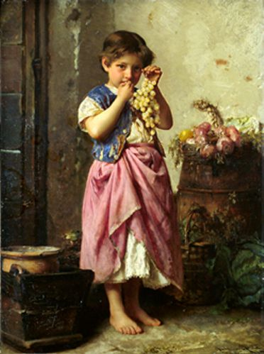 L'enfant avec les raisins